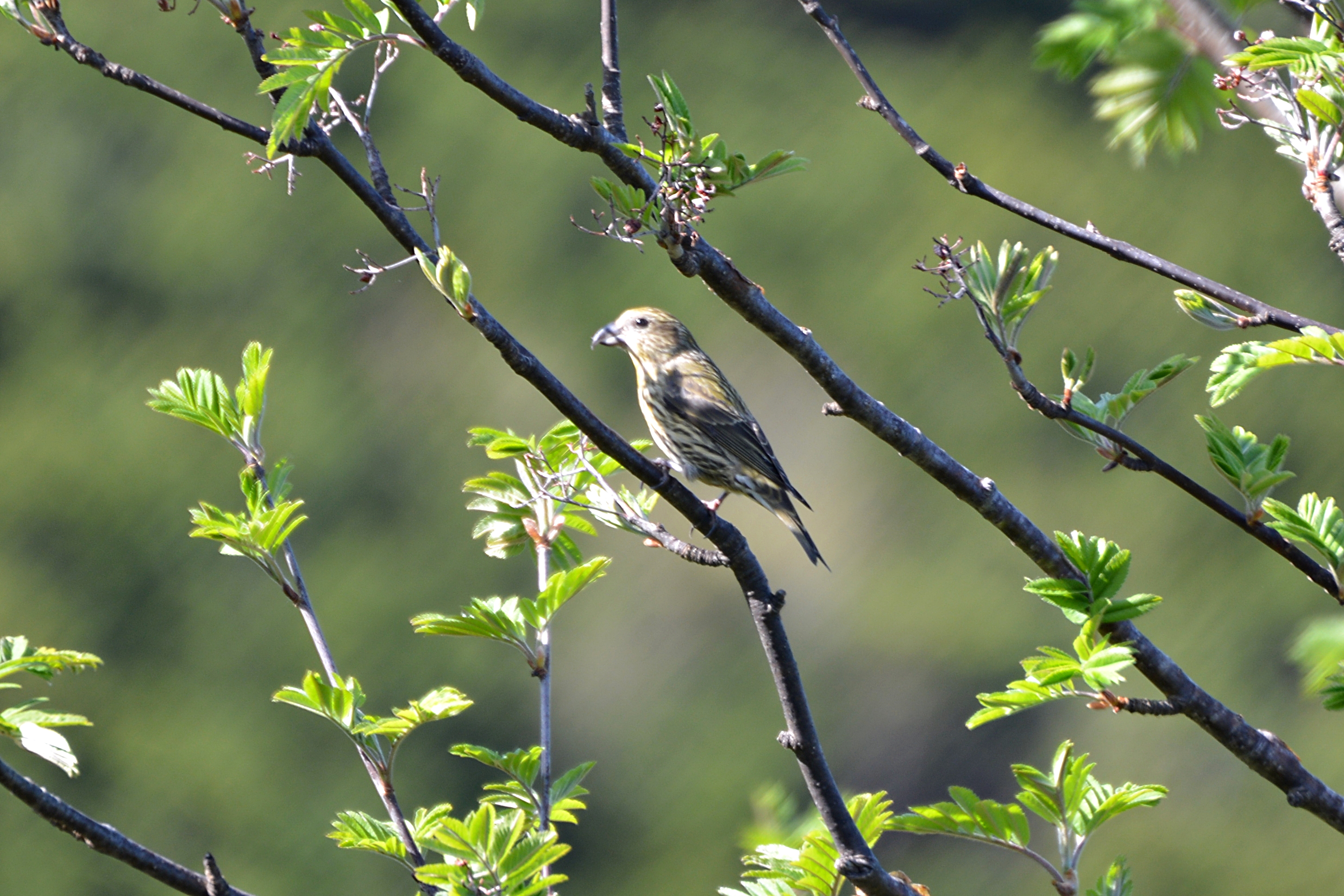 juveniler Fichtenkreuzschnabel in den Chiemgauer Alpen